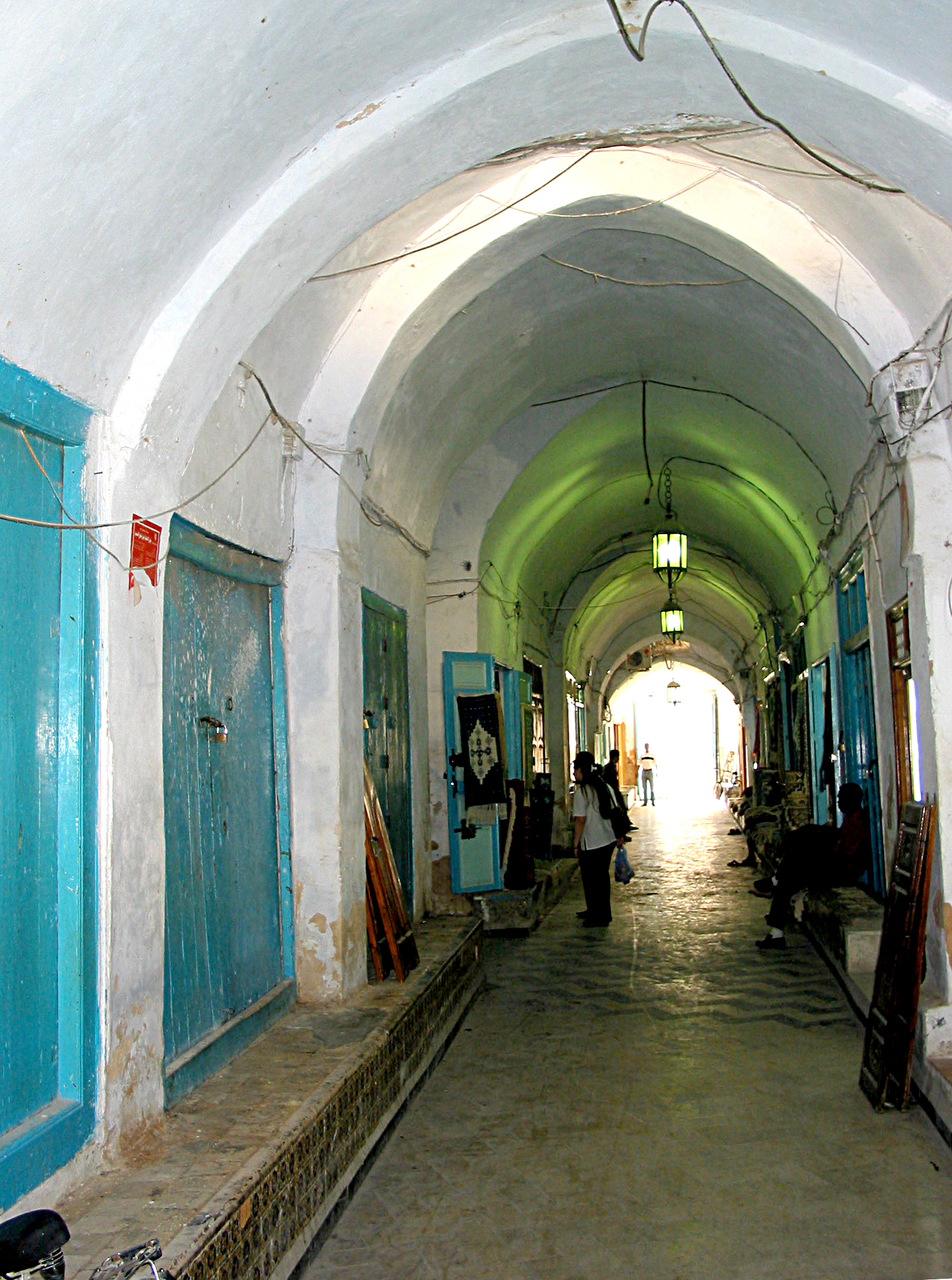 Kairouan